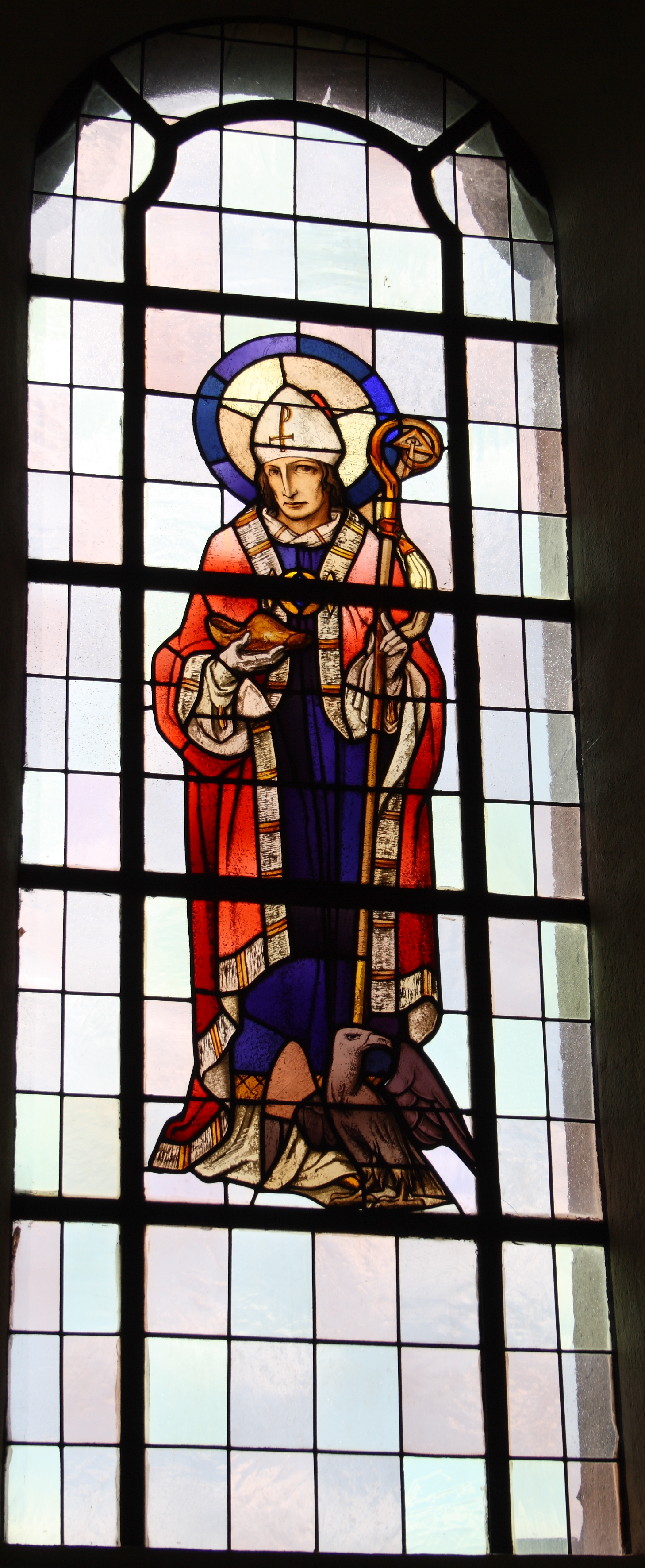 Bleiglasfenster im Chor der katholischen Pfarrkirche St. Servatius und Dorothea in Müllenbach, Darstellung: hl. Servatius, Herstellung: Glasmalerei H. Maier in Bad Neuenahr (siehe Karl Egon Siepmann: Pfarrkirche St. Servatius und Dorothea Müllenbach. In: Die Kirche mitten im Ort. Kirchen und Kapellen in der Verbandsgemeinde Adenau, hrsgg. von der Verbandsgemeinde Adenau, Adenau 2001, S. 85−86, ISBN 3-9804818-5-9)